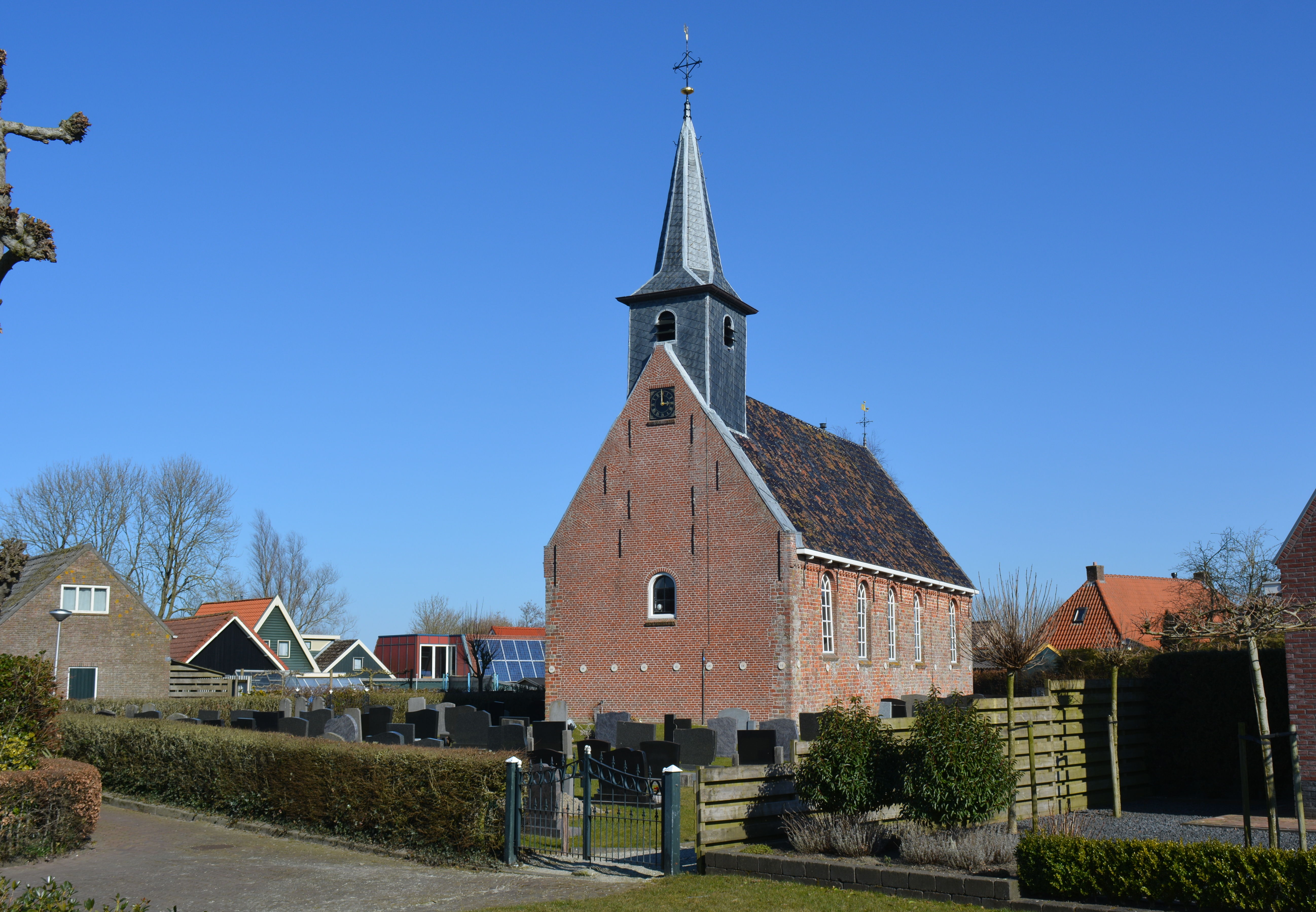 Kleastertsjerke, Nijewier